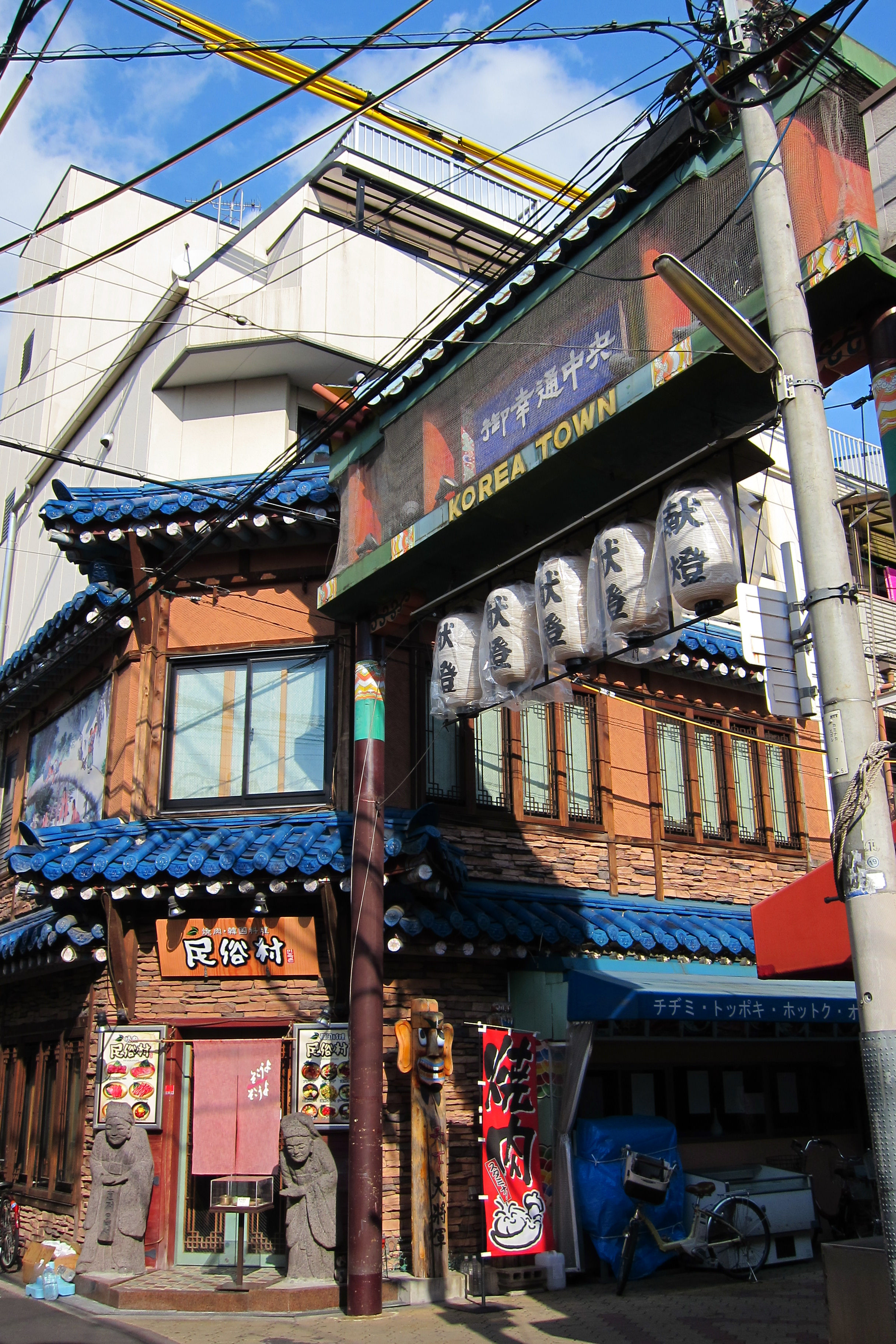 Ikuno Korea Town (御幸通中央商店街) at Osaka City, Japan.